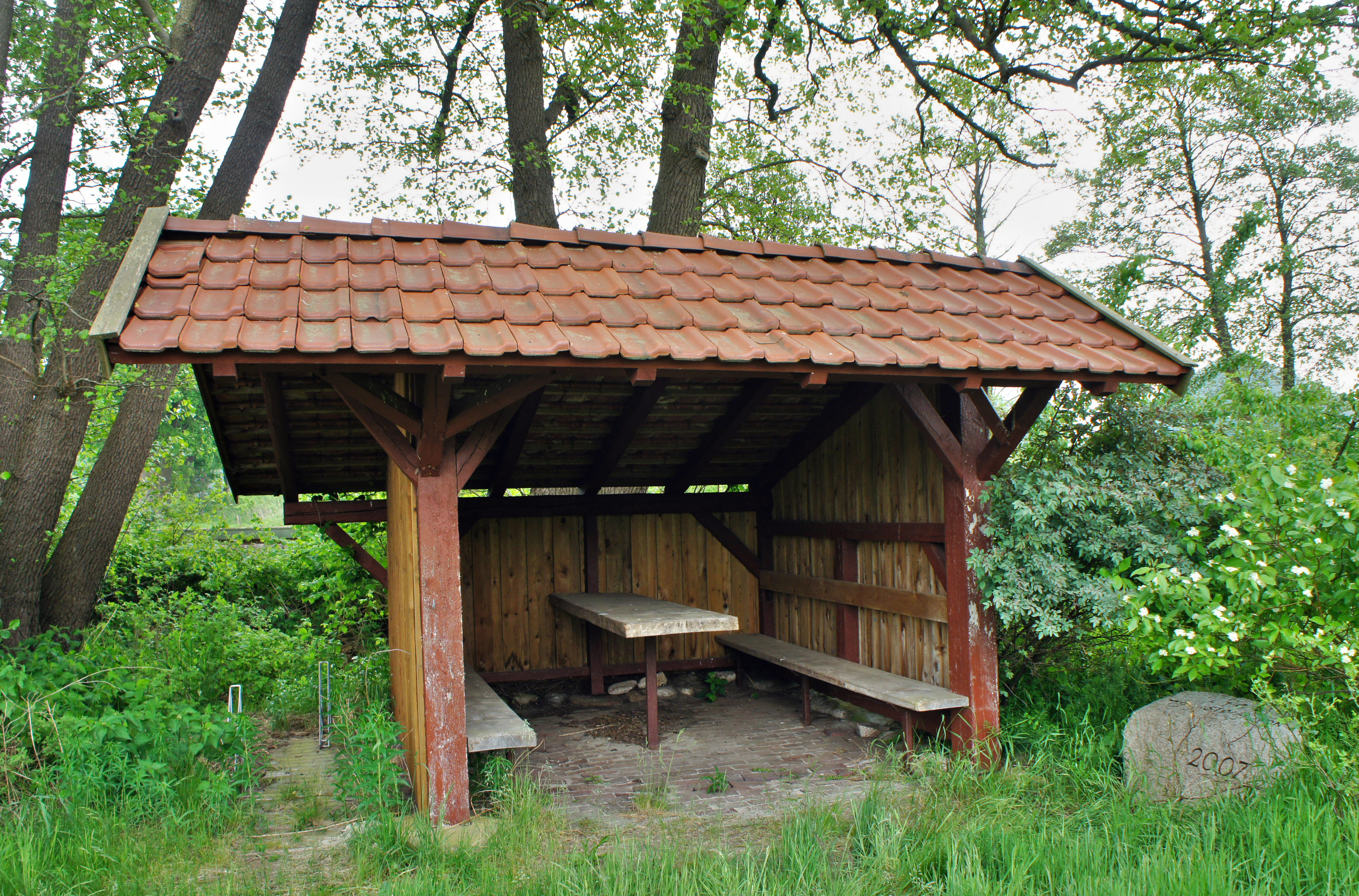 72-Stunden-Aktion der Landjugend Ganderkesee: Renovieren eines alten Unterstandes